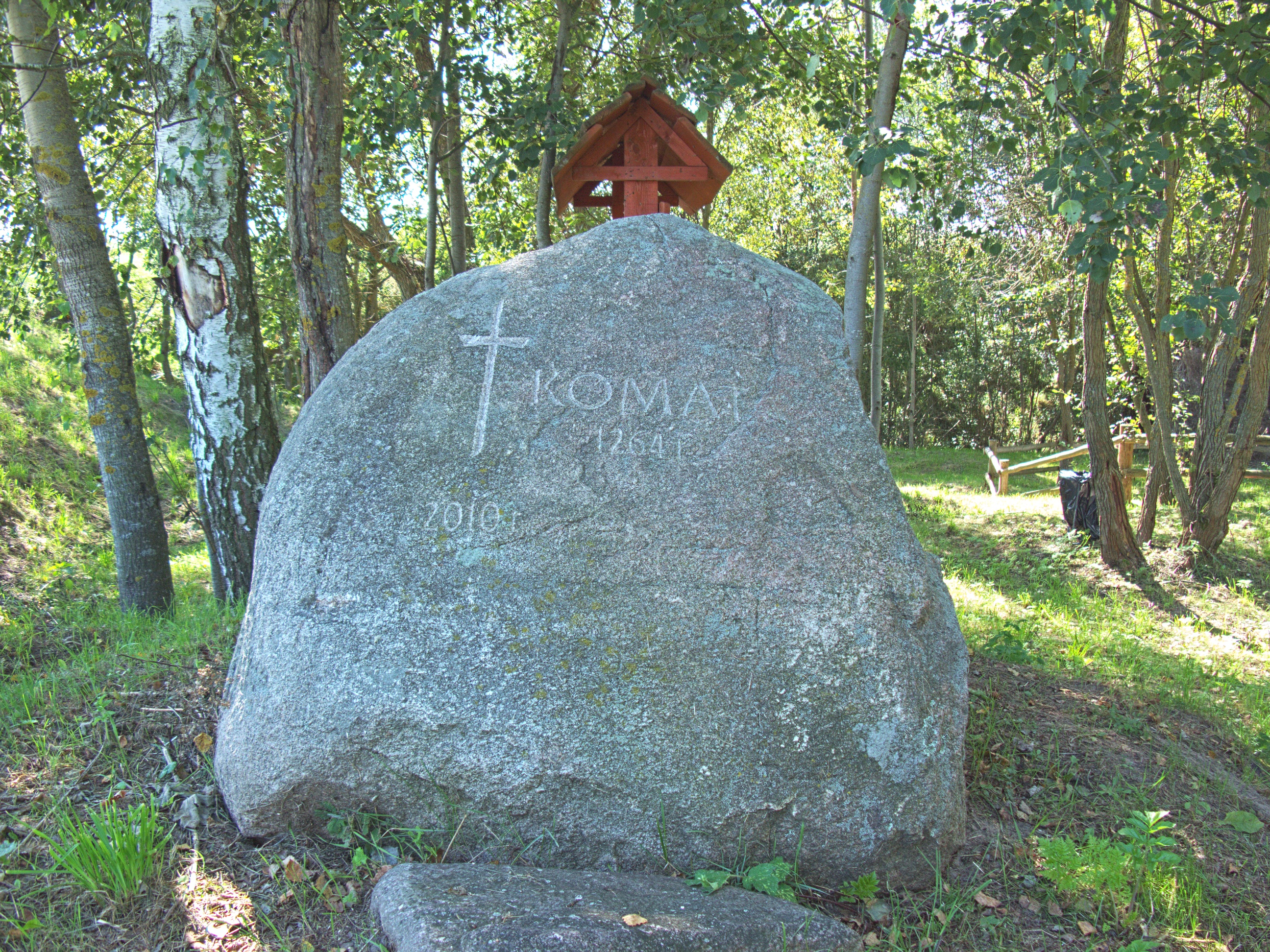 Uroczysko Kumat w pobliżu Brańska.